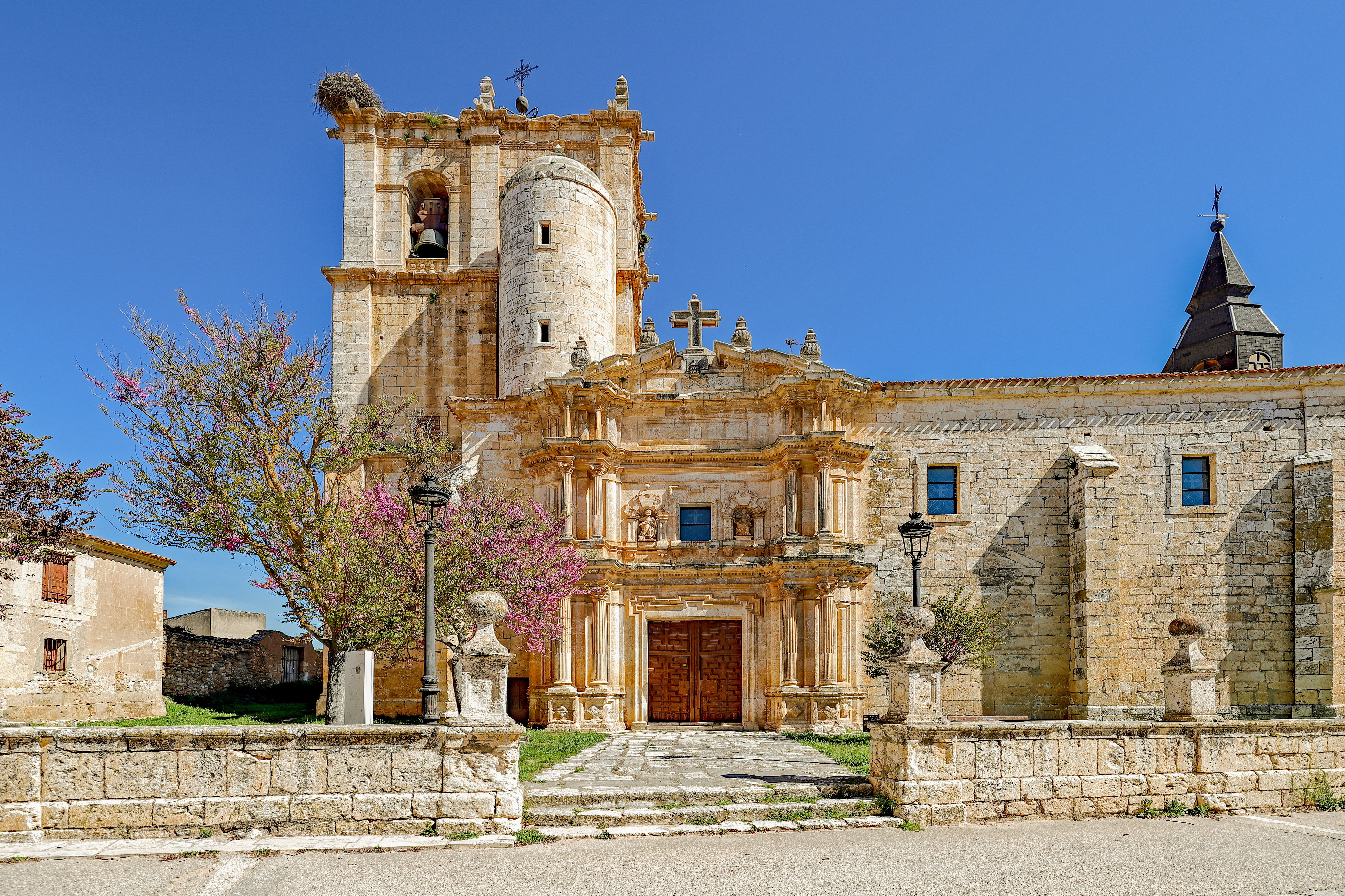 Sotillo de la Ribera es un municipio de la comarca Ribera del Duero, en la provincia de Burgos.